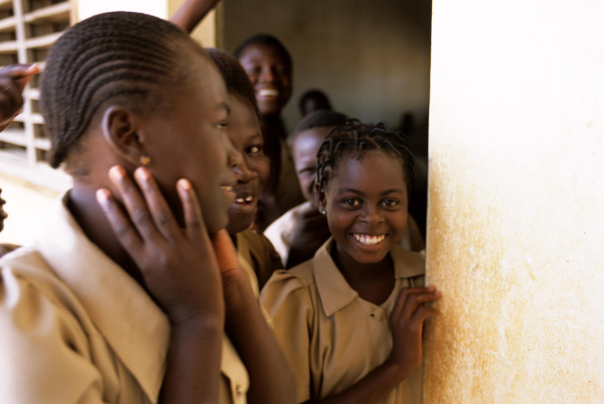 Beninois school children.